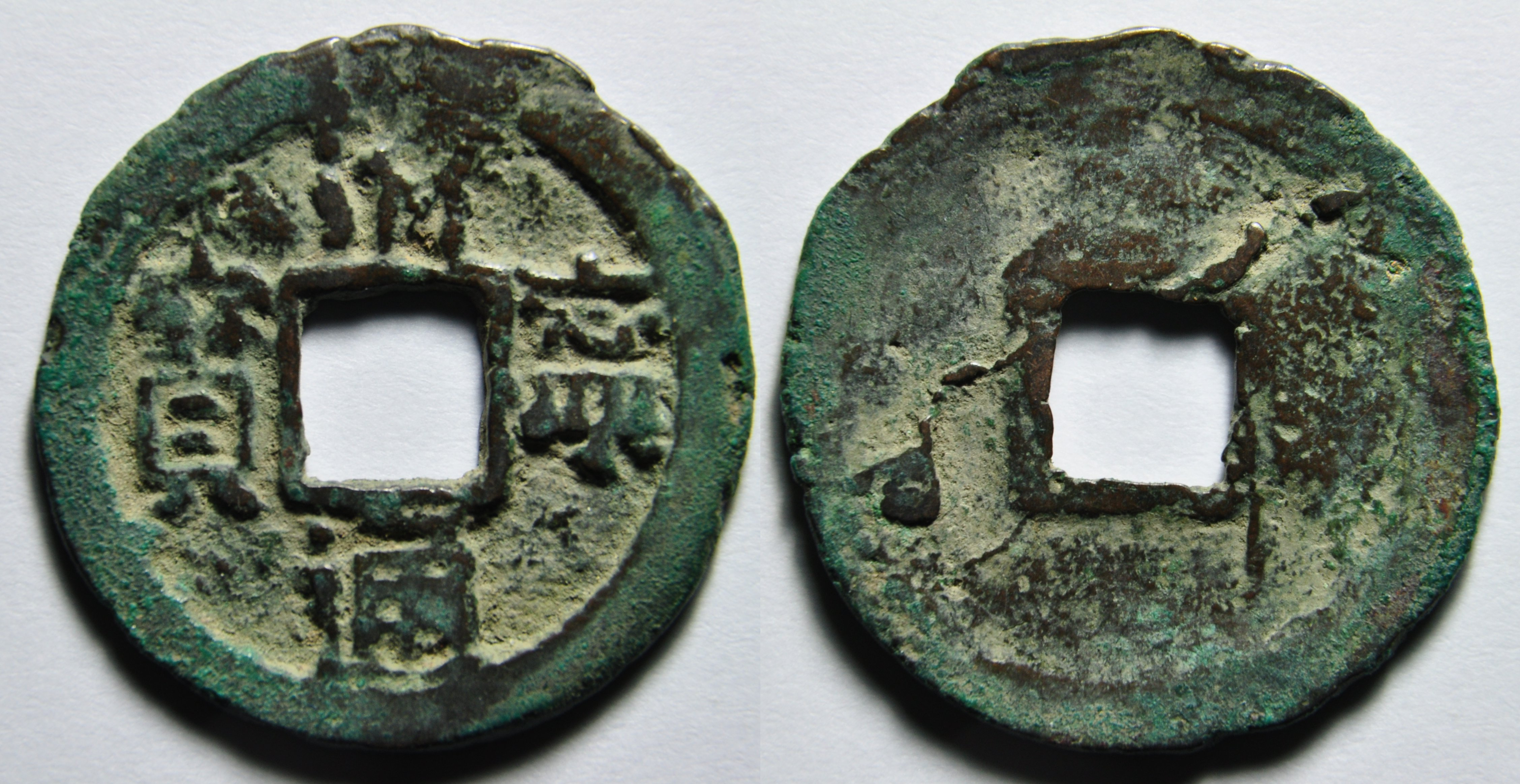 Une monnaie en bronze d'une sapèque de l'empereur Dao Zong (1055-1101), ère Qing Ning (1055-1064) de la dynastie Liao (907-1125). A/ Qing Ning tong bao (Monnaie courante de Qing Ning) R/ vide Dimension : 25 mm Poids : 2,93 mm Remarque : La dynastie Liao n'est pas une dynastie chinoise mais une dynastie gouvernant l'empire Khitan, situé au Nord-Est de la Chine. Les livres chinois d'histoire parle de ces tribus depuis le IIIe et IVe siècle. Les Khitans seraient issus des Xianbei. Ils sont tributaires de la Chine des Tang. La dynastie a été fondée par Yelü Abaoji (872-926) qui deviendra l'empereur Liao Taizu (907-926). En 1055, l'empereur Xingzong (1031-1055) meurt et son fils ainé, Yelü Hongji, devient empereur sous le nom de Daozong. Son règne est surtout marqué par une rébellion en 1063 et un complot mené par le chancelier Yelü Yixin entre 1072 et 1079 ainsi qu'une guerre entre 1092 et 1102 contre des Tatars appelés Zubu. La dynastie Liao est détruite par la dynastie Jin en 1125. Référence : H18.12, S1066 Indice de rareté : 9, assez commune d'après D.Hartill